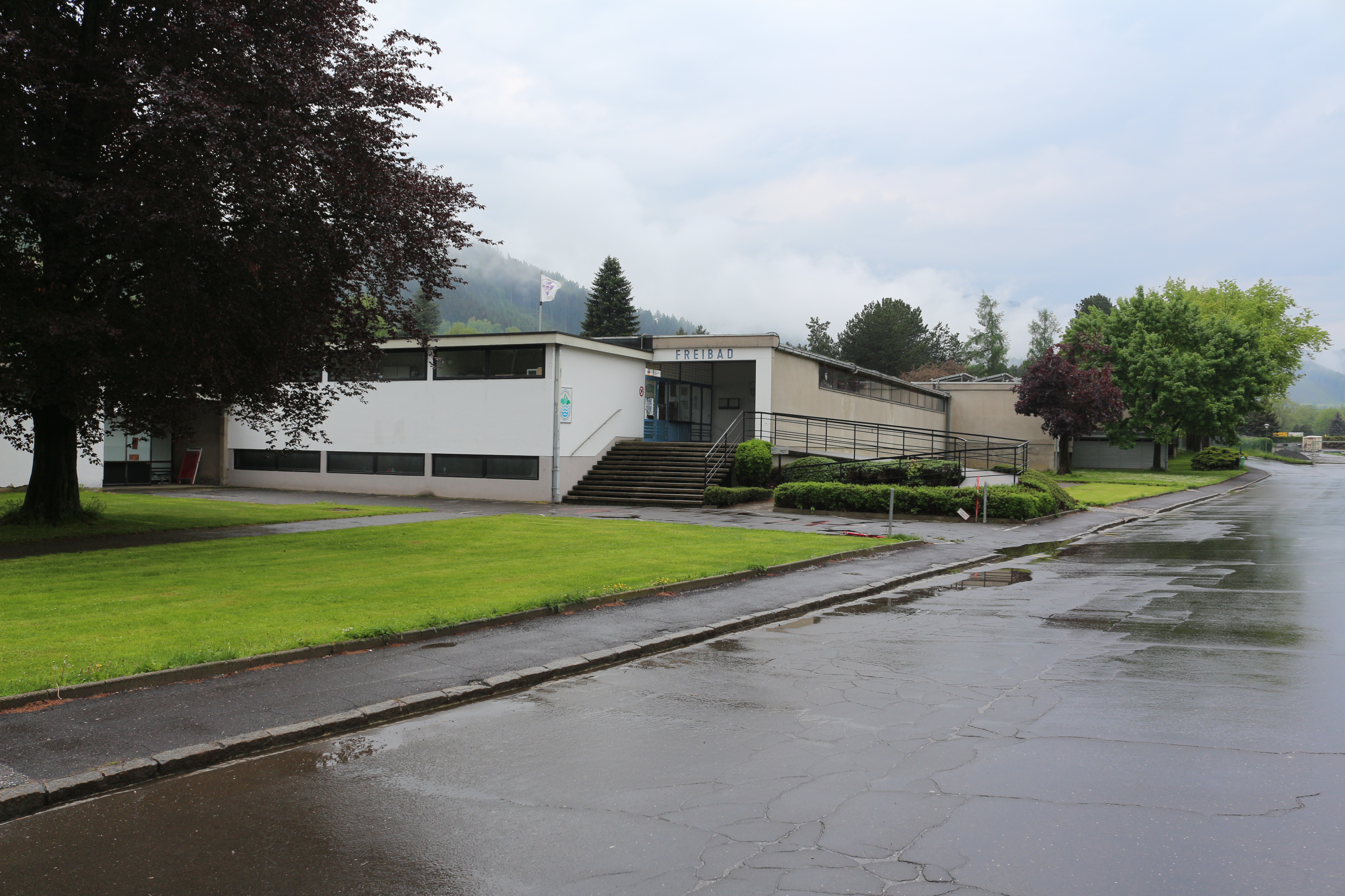 Freibad Bruck an der Mur; Vorderseite